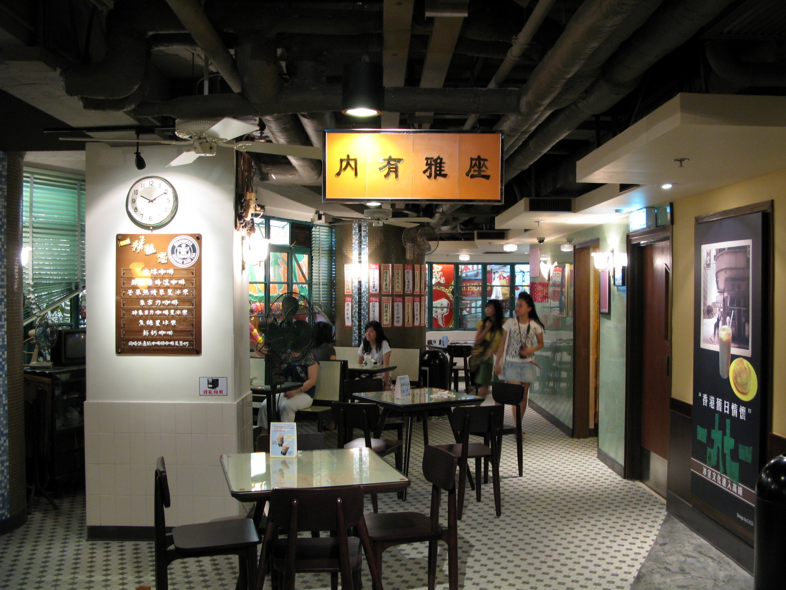 Hong Kong Duddell Street Starbucks 中環zh:都爹利街zh:星巴克